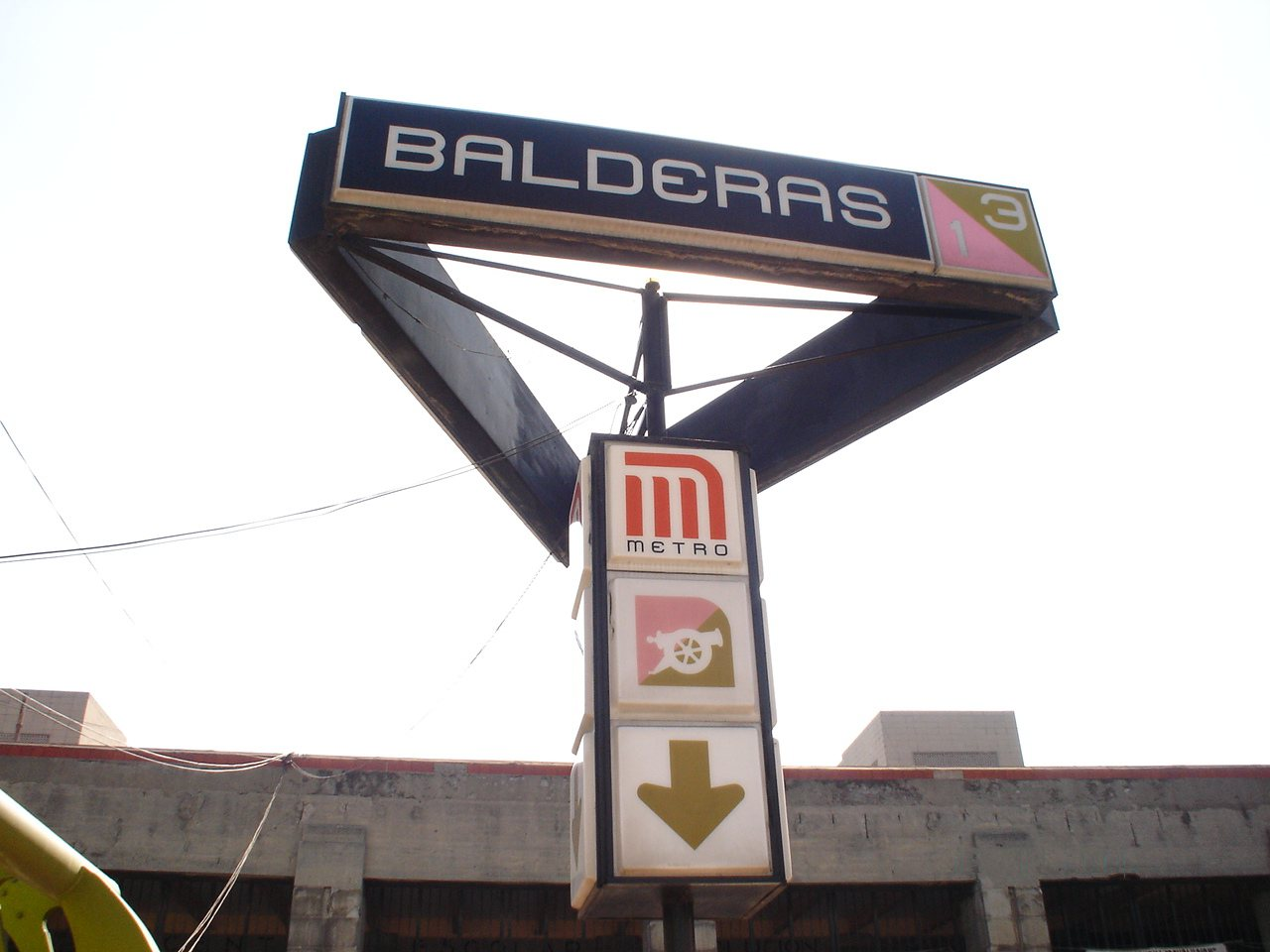 Estacion Balderas.